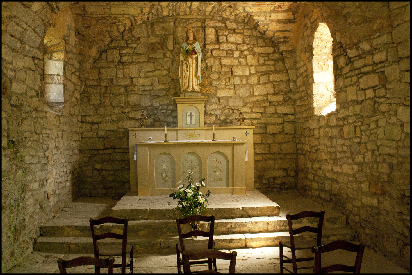 L'intérieur de la chapelle des mariniers de Cajarc dans le Lot (Midi-Pyrénées, France). .